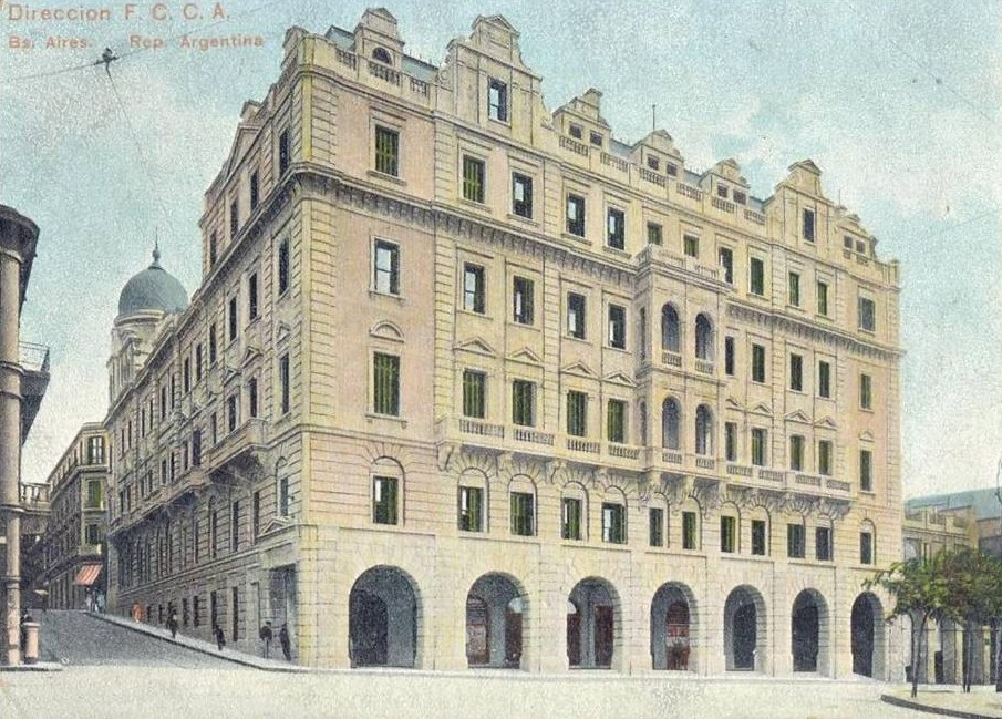 Edificio de la dirección del FC Central Argentino en Buenos Aires. Arquitecto Eustace Lauriston Conder, año 1900.